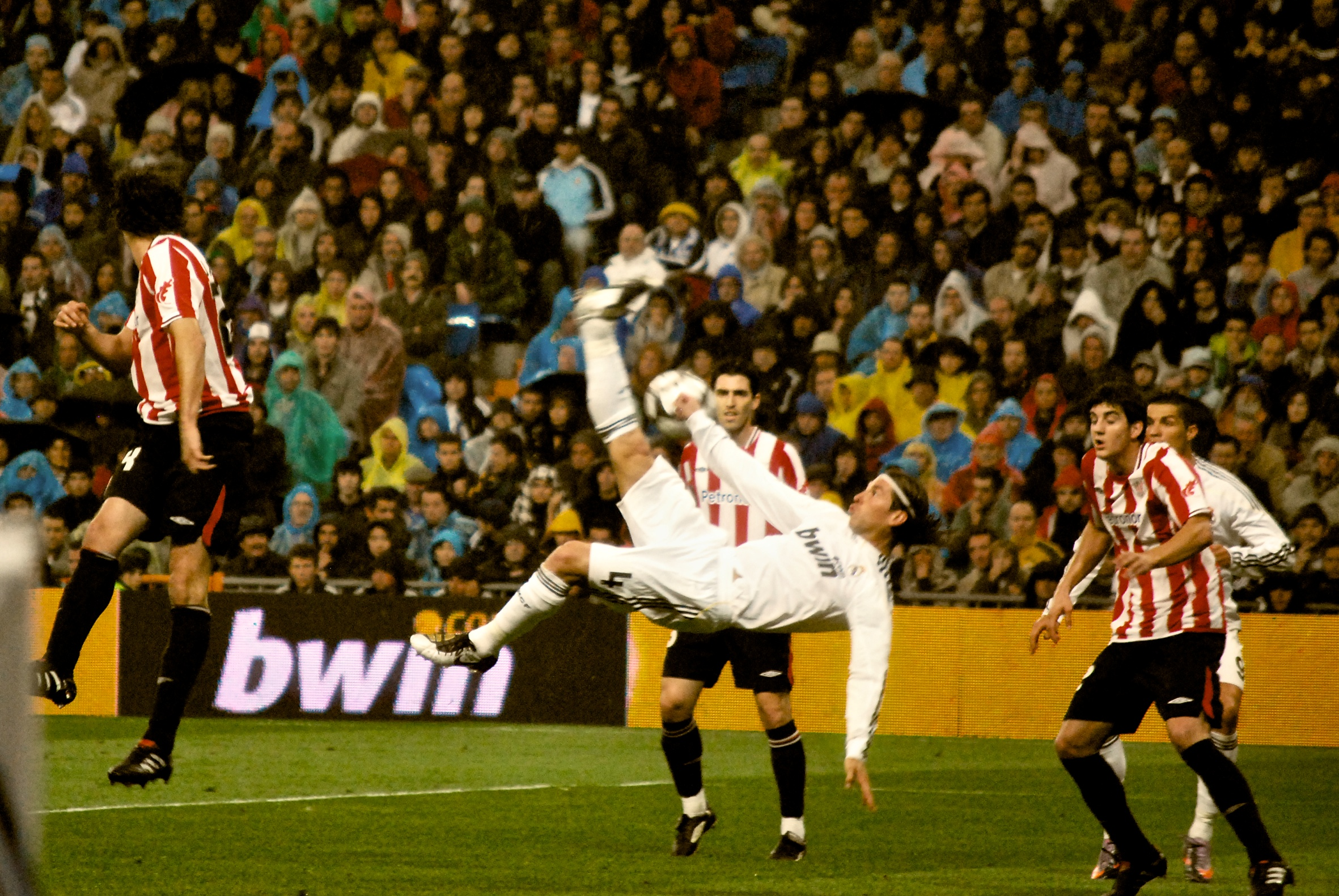 Una chilena, ejecutada por Sergio Ramos.